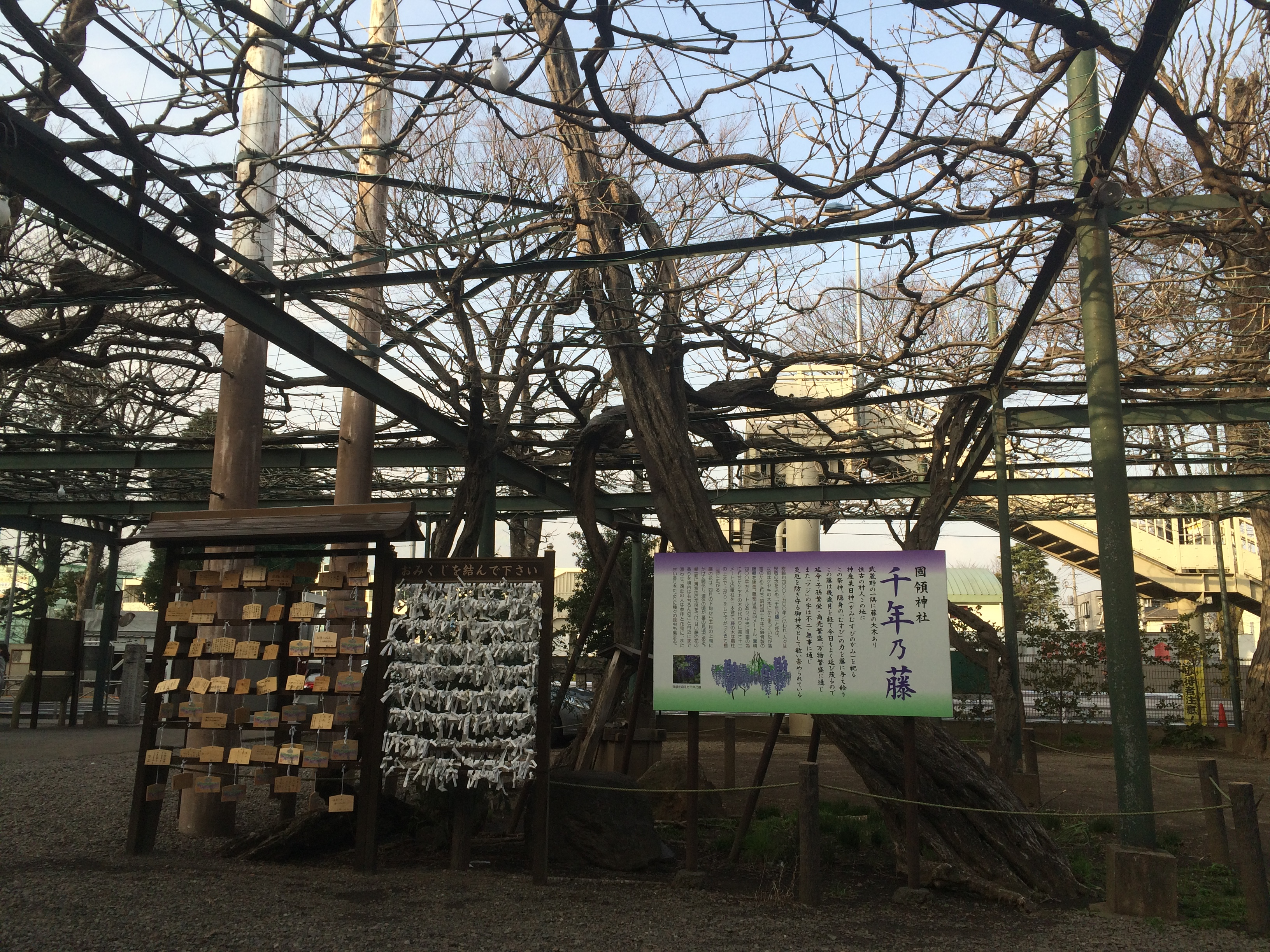 東京都調布市国領町の國領神社の境内にある「千年乃藤」（御神木）。